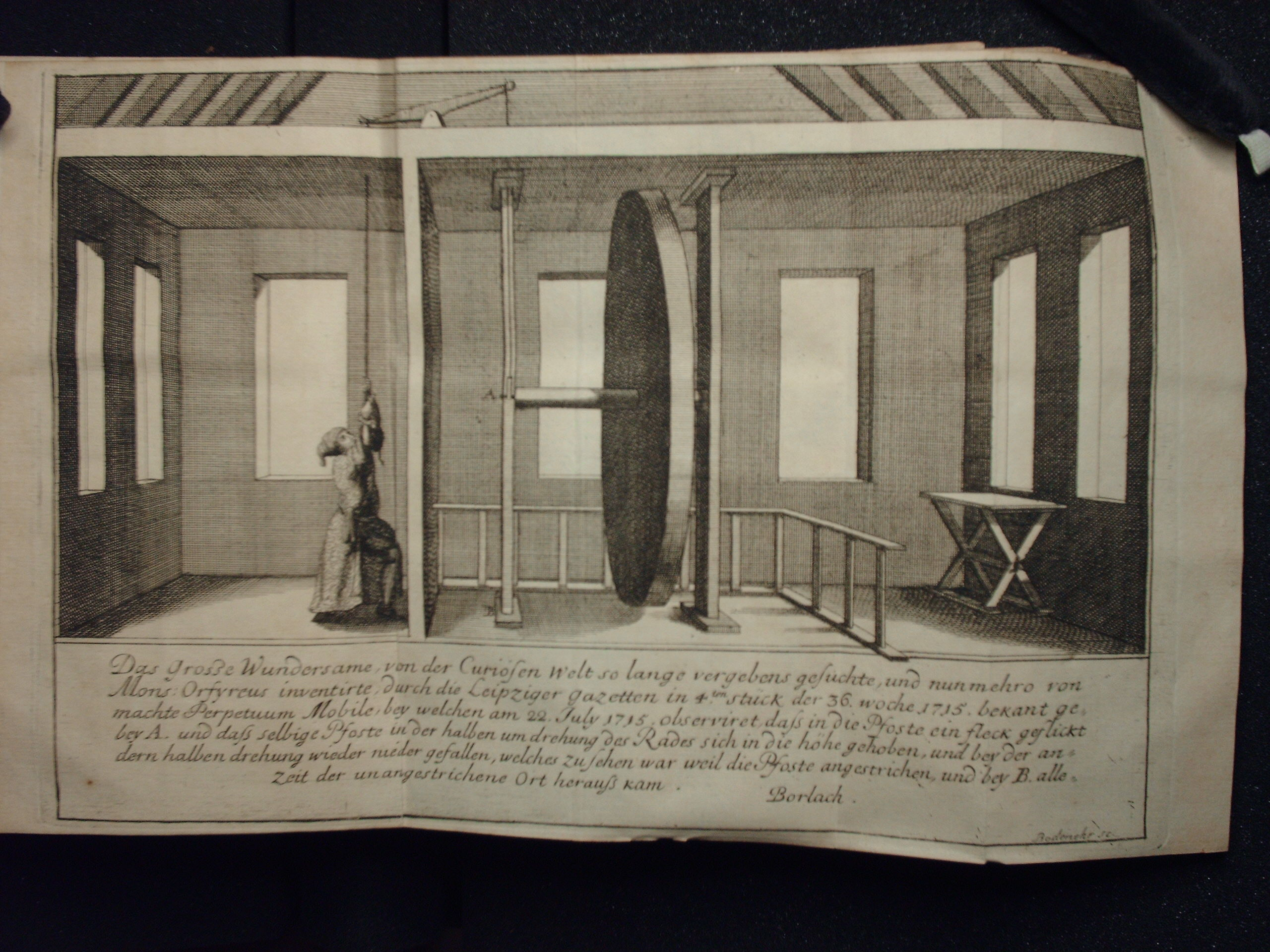 Zeitgenössische Mutmaßung über den tatsächlichen Antrieb des Besslerschen Perpetuum mobile